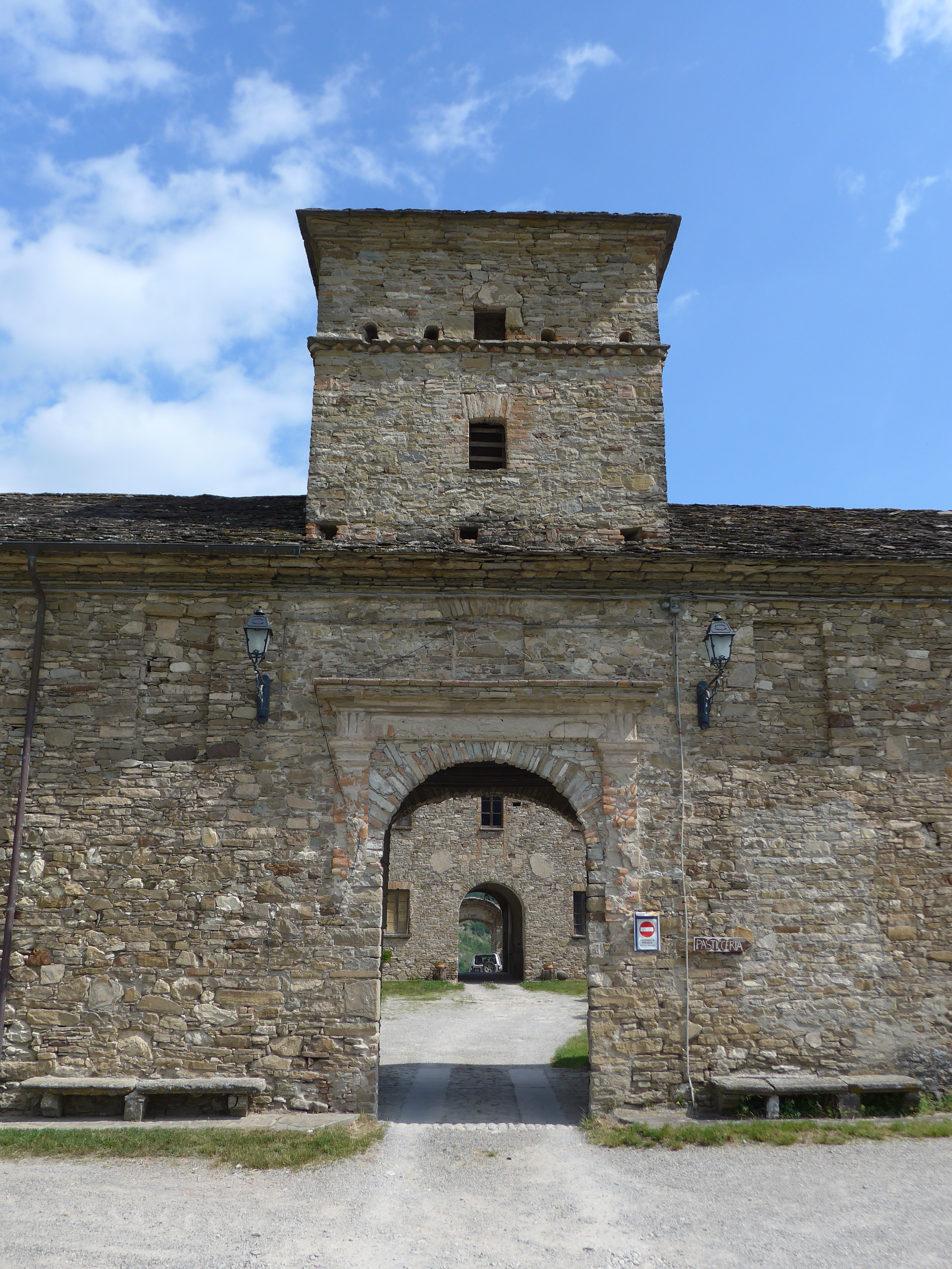 Varsi, entrata del castello di Golaso.